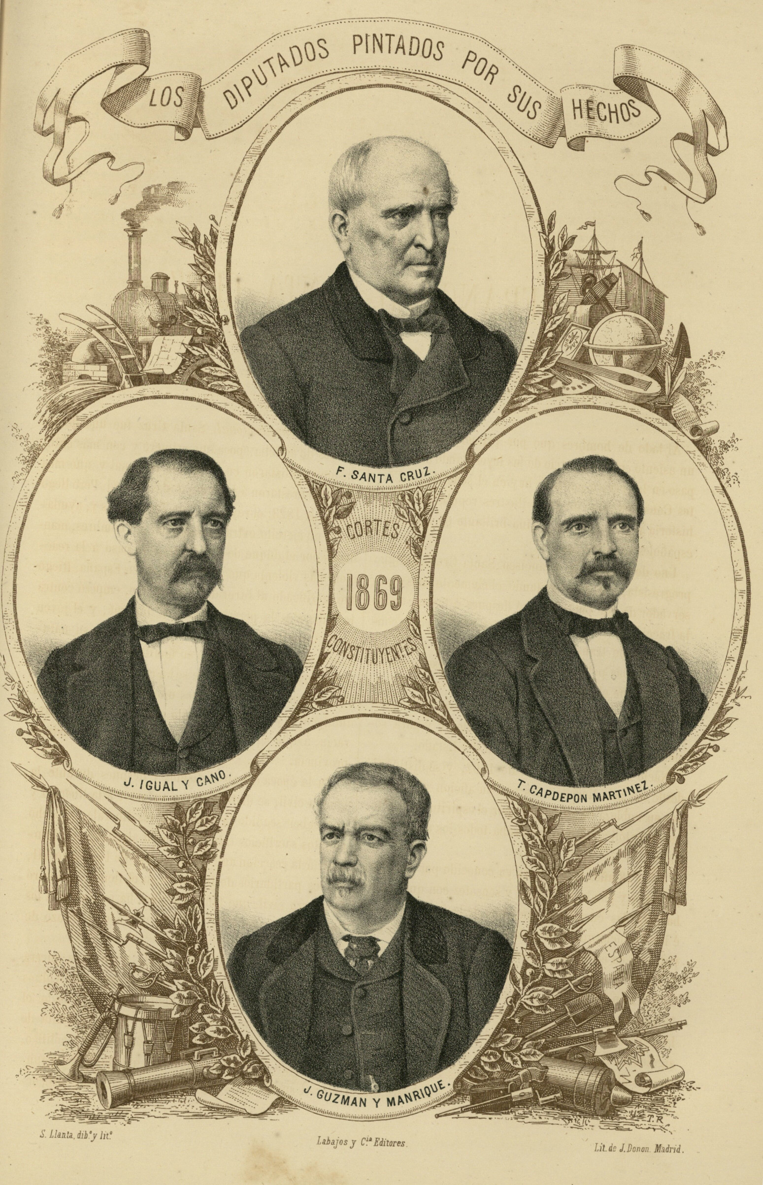 Francisco Santa Cruz, José Igual y Cano, Tomás Capdepón, José Guzmán y Manrique. Litografía de Santiago Llanta para "Los diputados pintados por sus hechos. Colección de estudios biográficos sobre los elegidos por el sufragio universal en las constituyentes de 1869 recopilados por distintos literatos", t. II, Madrid, R. Labajos y Compañía editores, 1869.